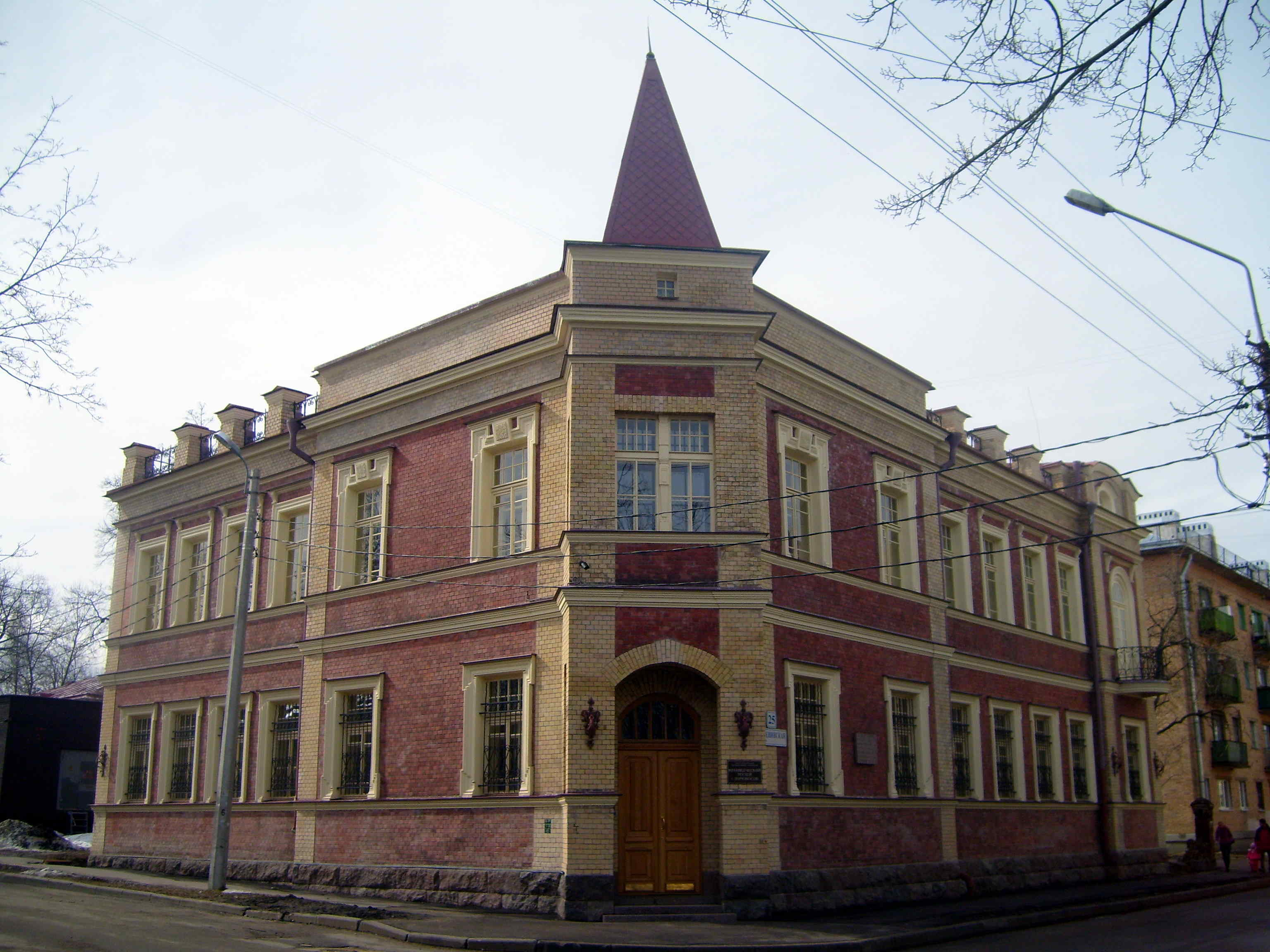 Краеведческий музей, на ул. Еленинской, Ораниенбаум (Ломоносов)